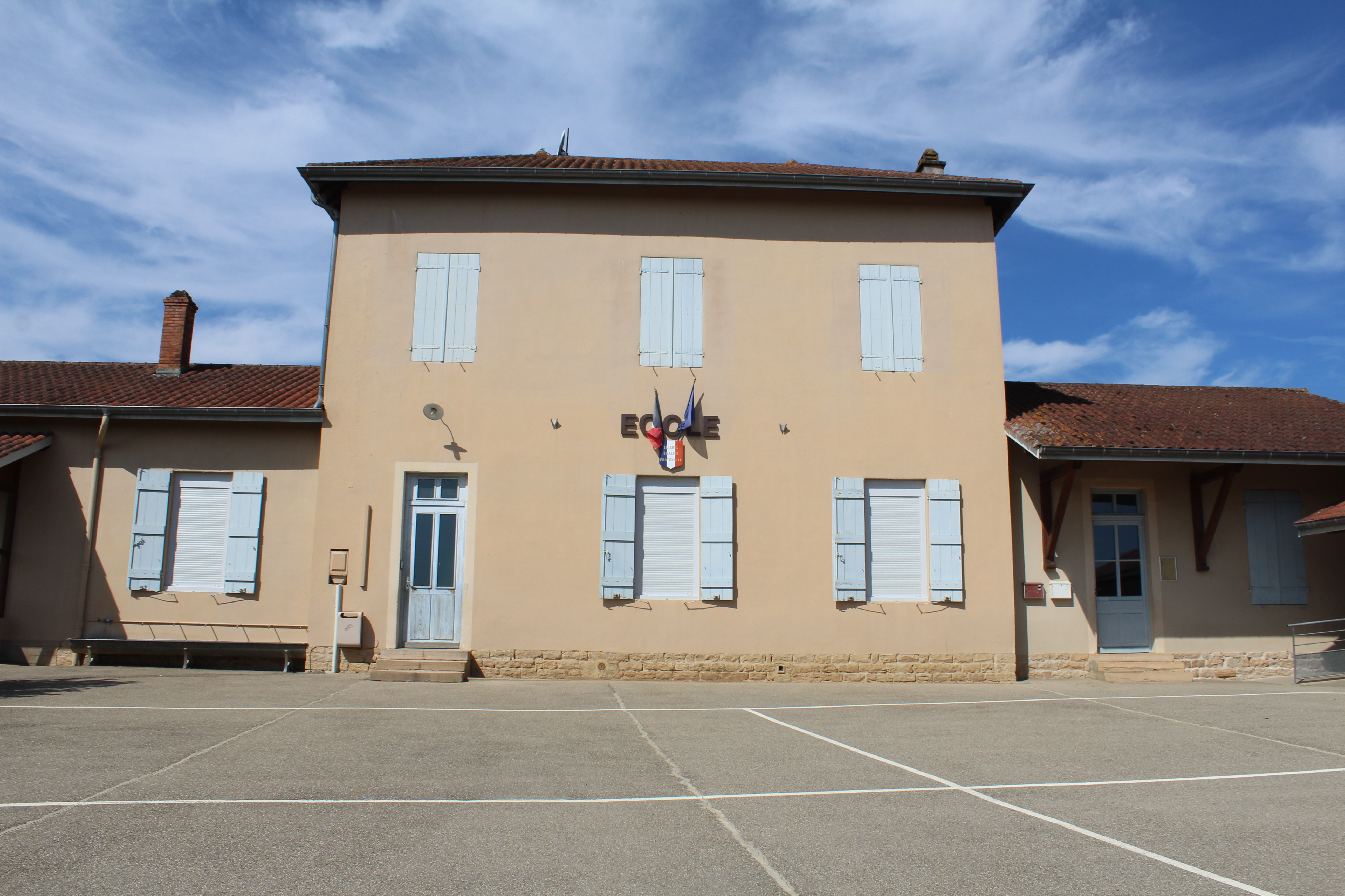 École communale de Saint-Julien-sur-Veyle.